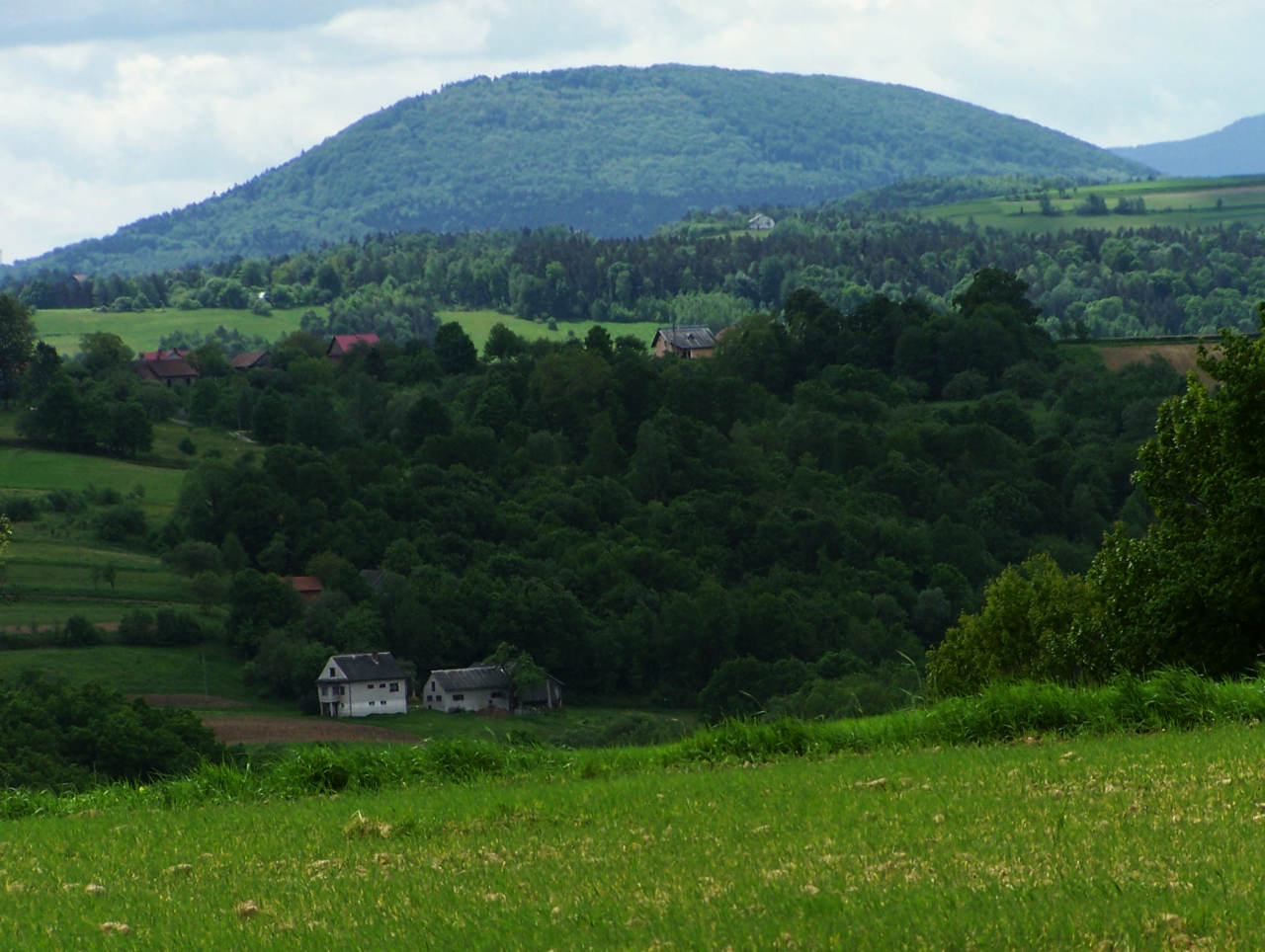 Kostrza (Beskid Wyspowy)